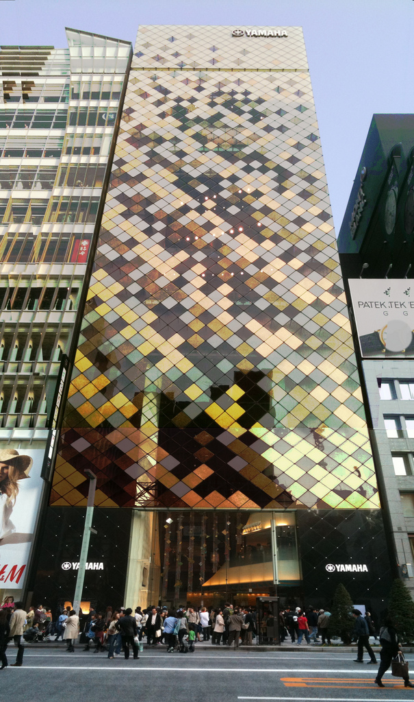 Yamaha Ginza Store